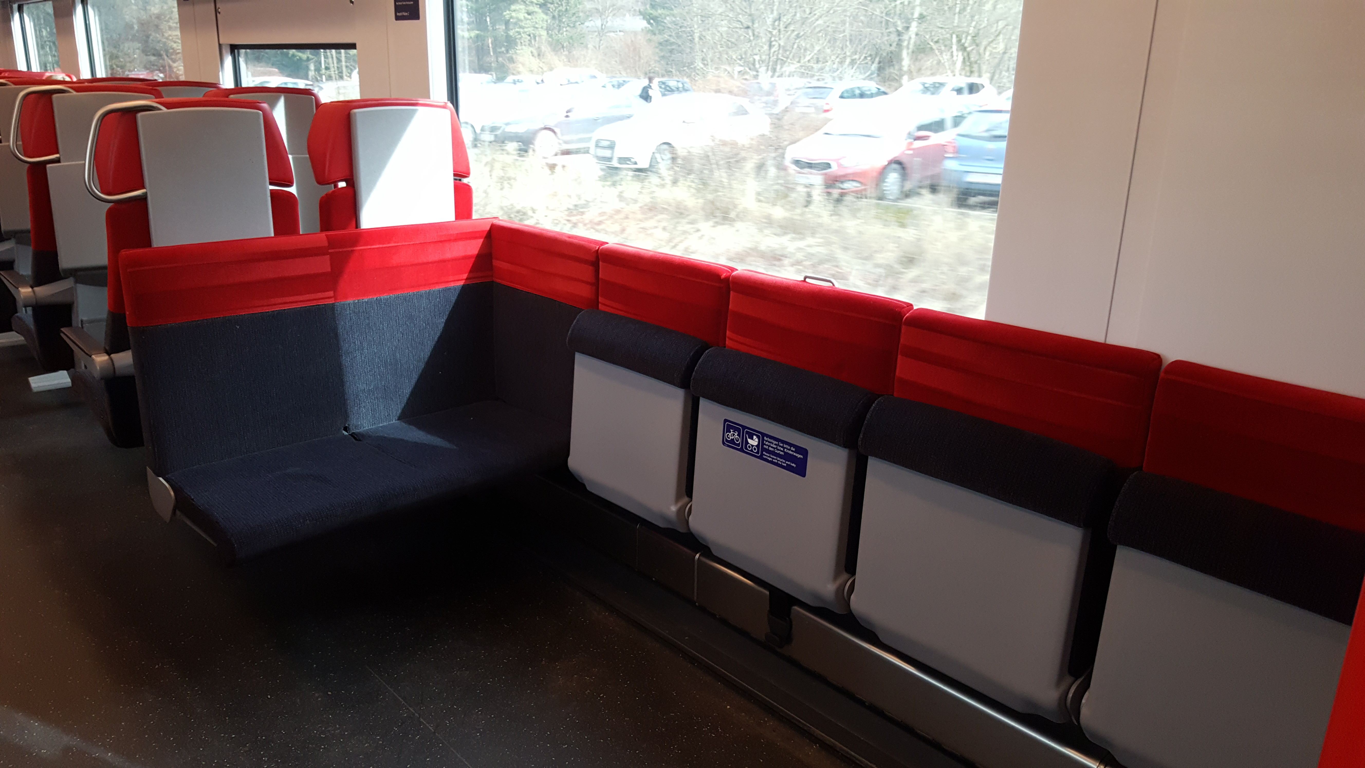 Mehrzweckbereich z.B. für Fahrräder im ÖBB Cityjet